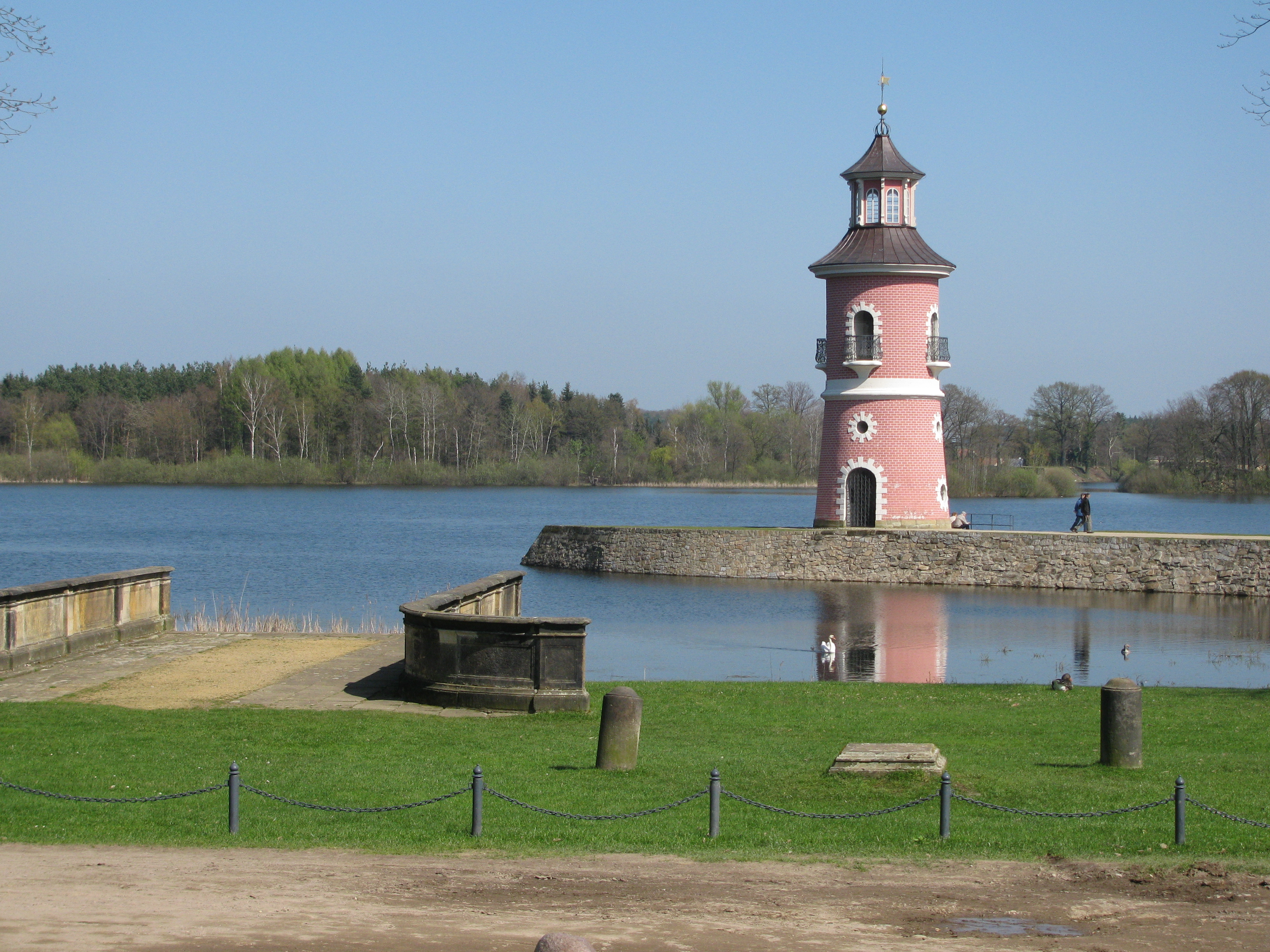 Leuchtturm Moritzburg, Sachsen, am Niederen Großteich bei Bärnsdorf